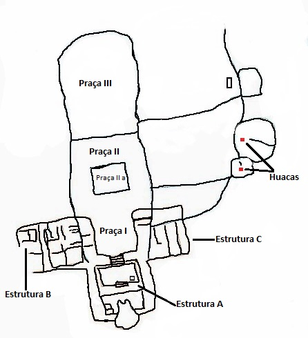 esboço do sitio arqueológico de Haricanga